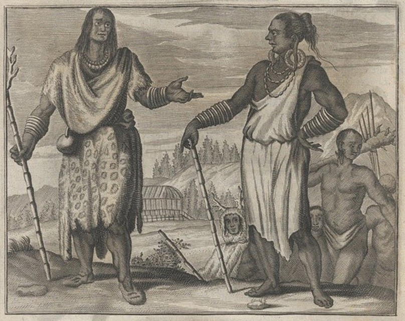 Illustration from Olfert Dapper (1670): Gedenkwaerdig bedryf der Nederlandsche Oost-Indische Maetschappye